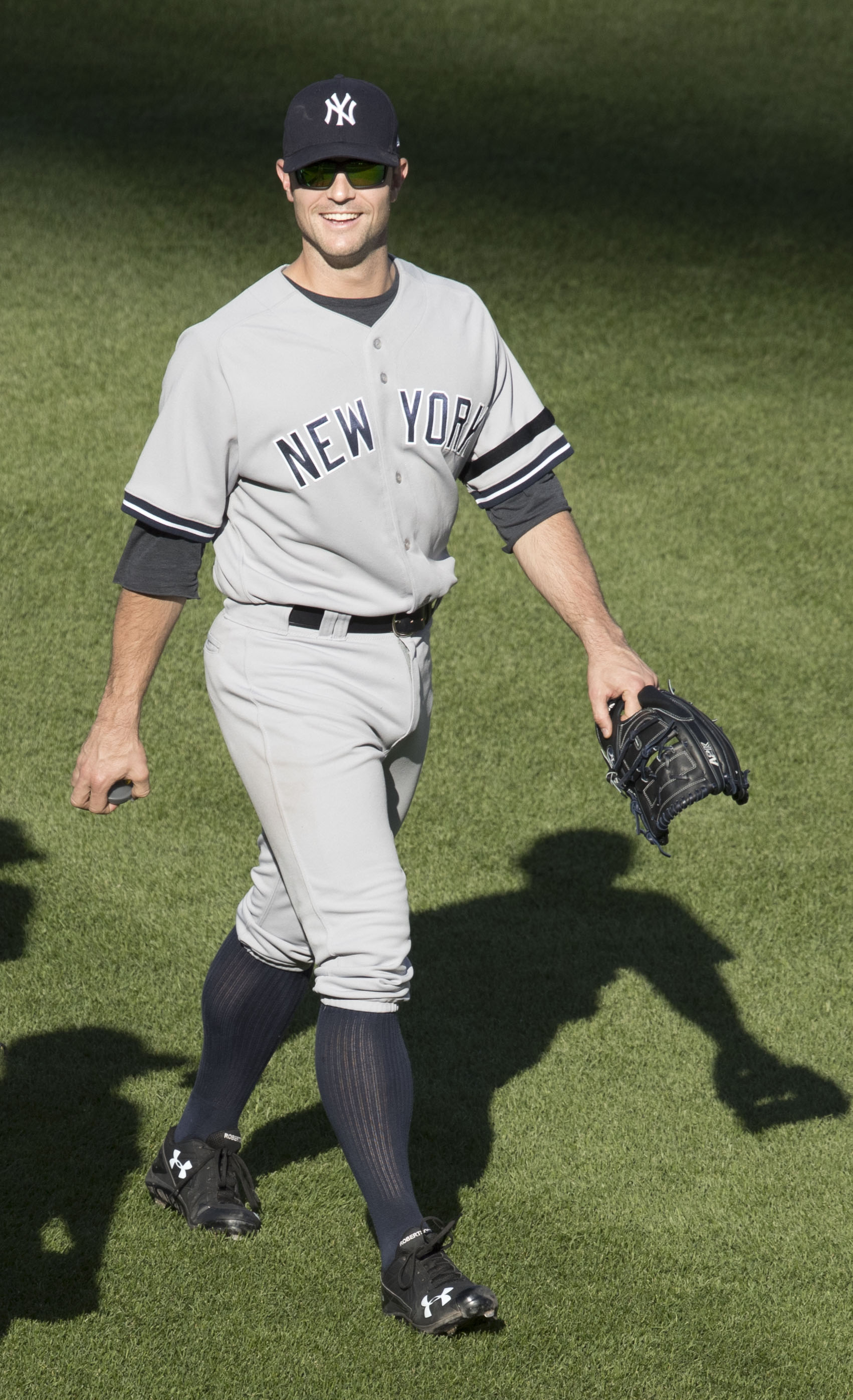 Yankees at Orioles 9/7/17